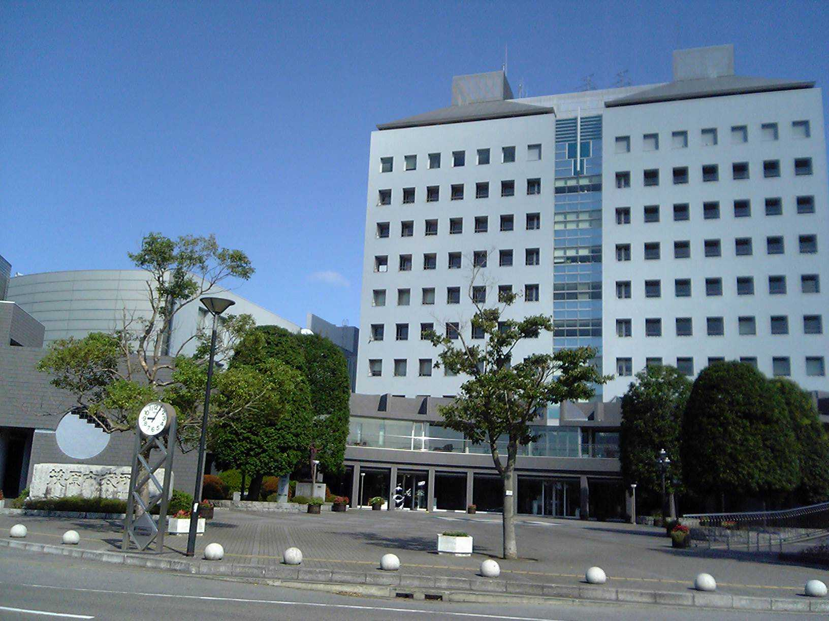 Mobara City Hall, Mobara, Chiba, Japan